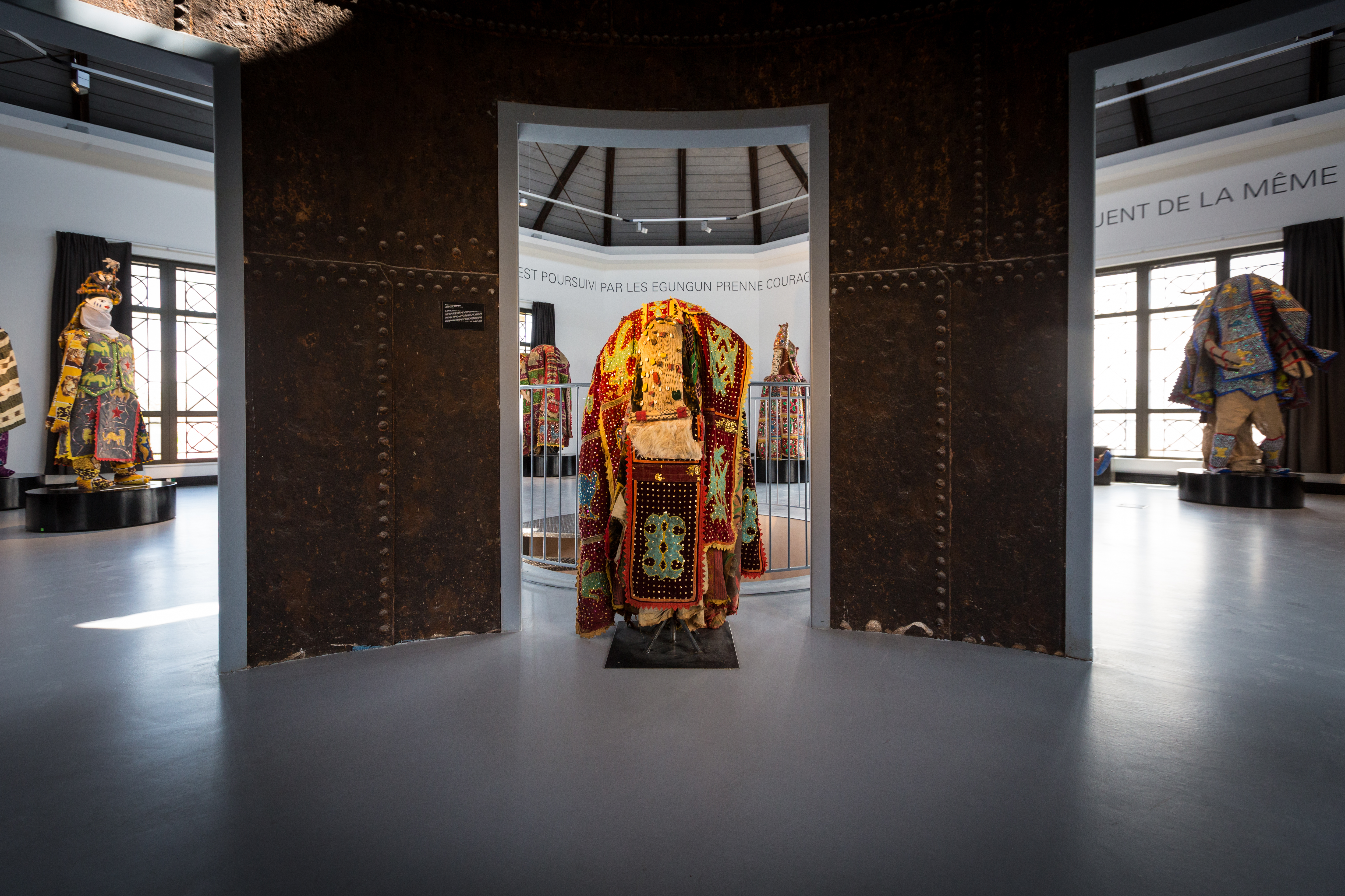 Musée Vodou collection Arbogast Strasbourg mai 2014